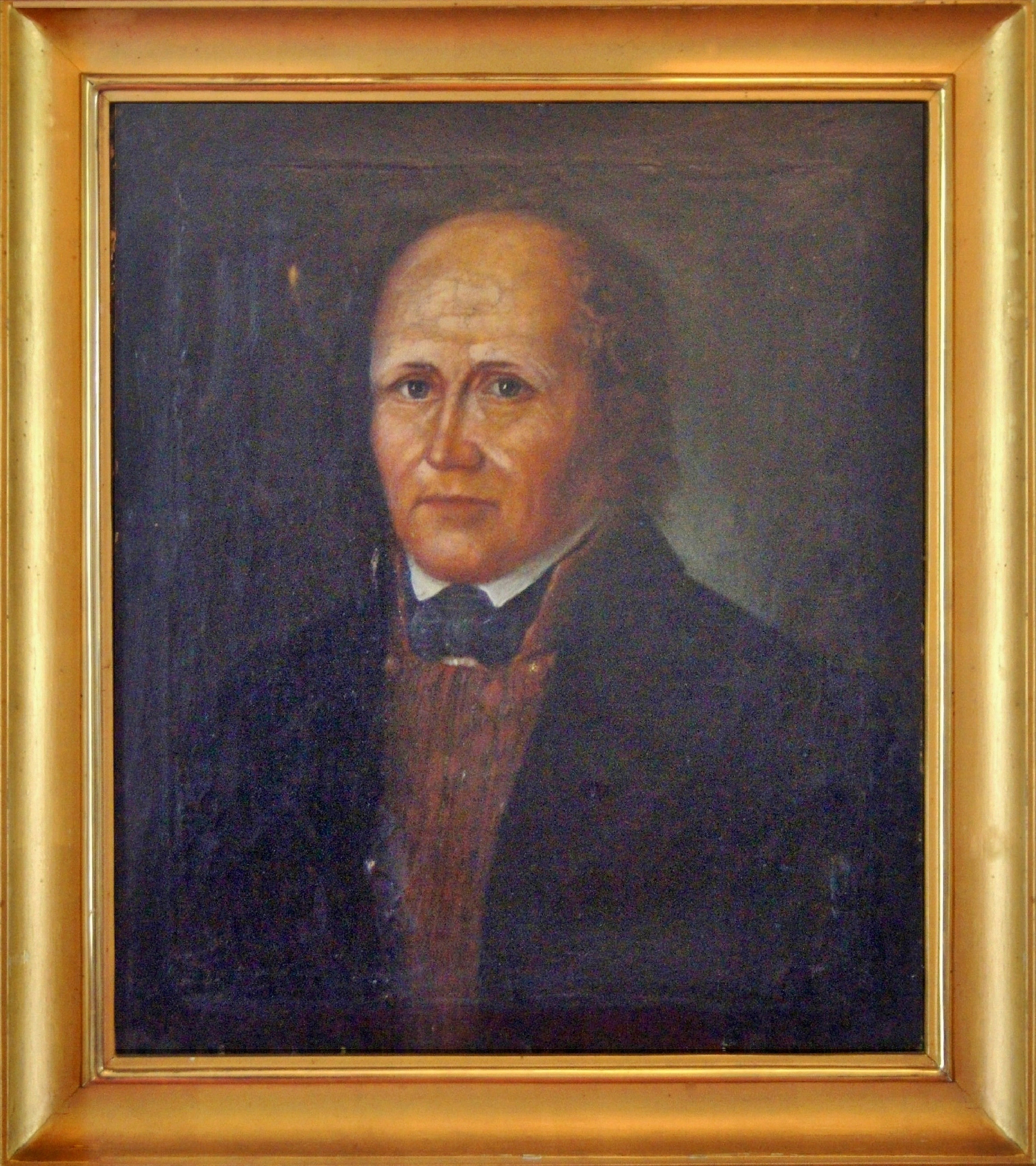 Kyrkorådet Eric Ericsson i Ruda, porträtt målat av G A Engman omkring 1844